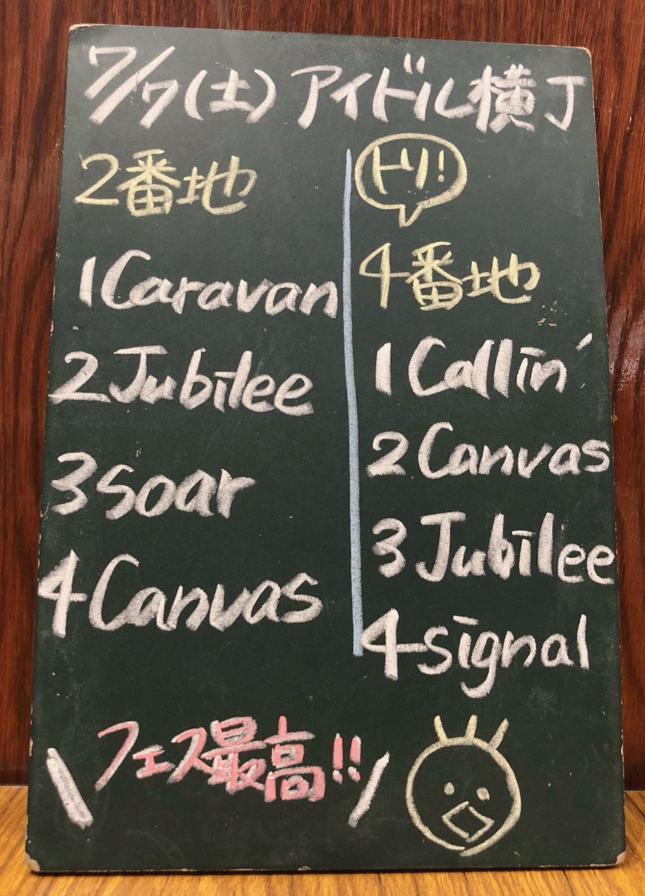 amiinAセトリボード(20180707(1))